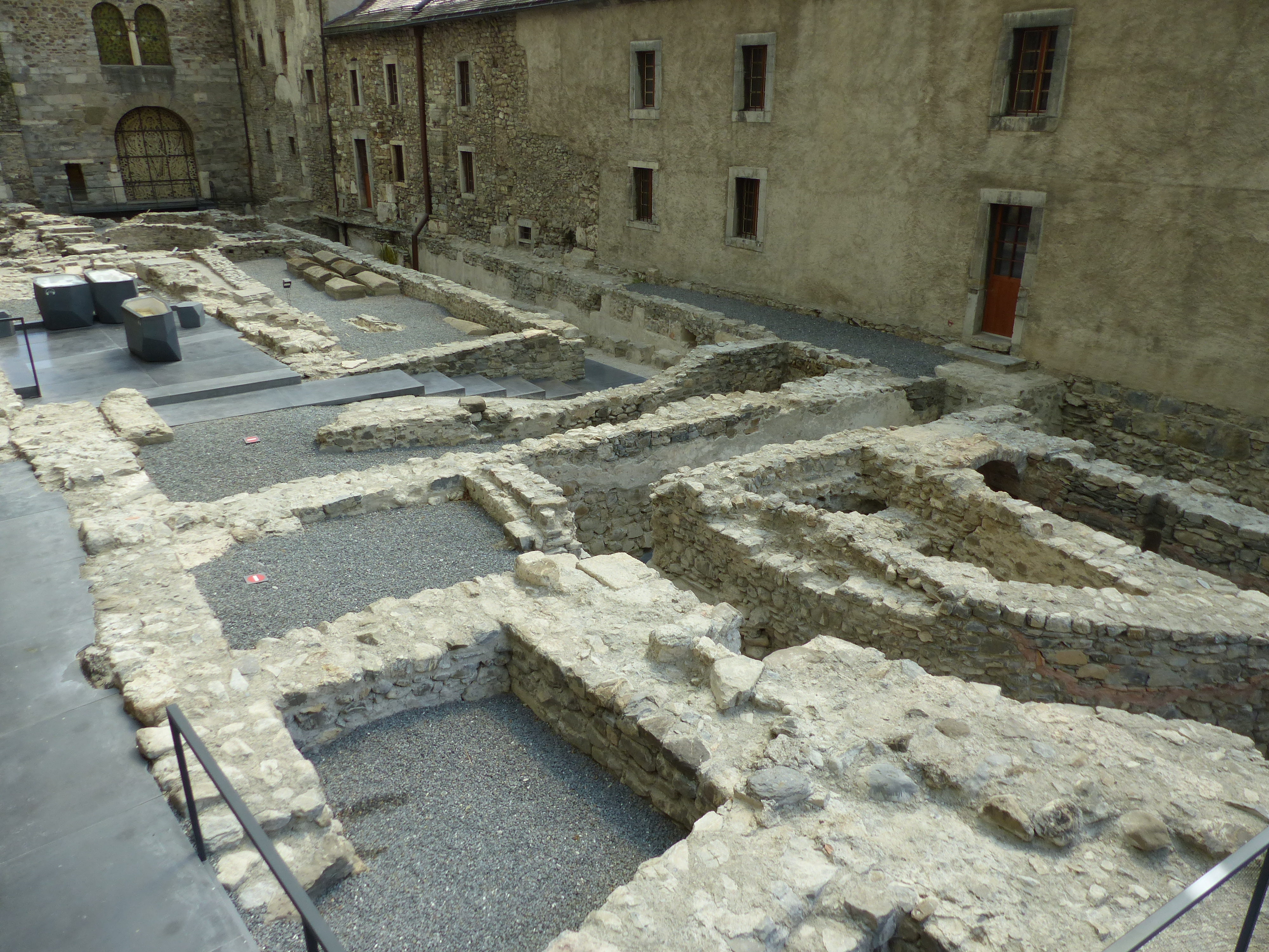 Abbaye de Saint-Maurice d'Agaune: Ausgrabungen der Vorgängerkirchen